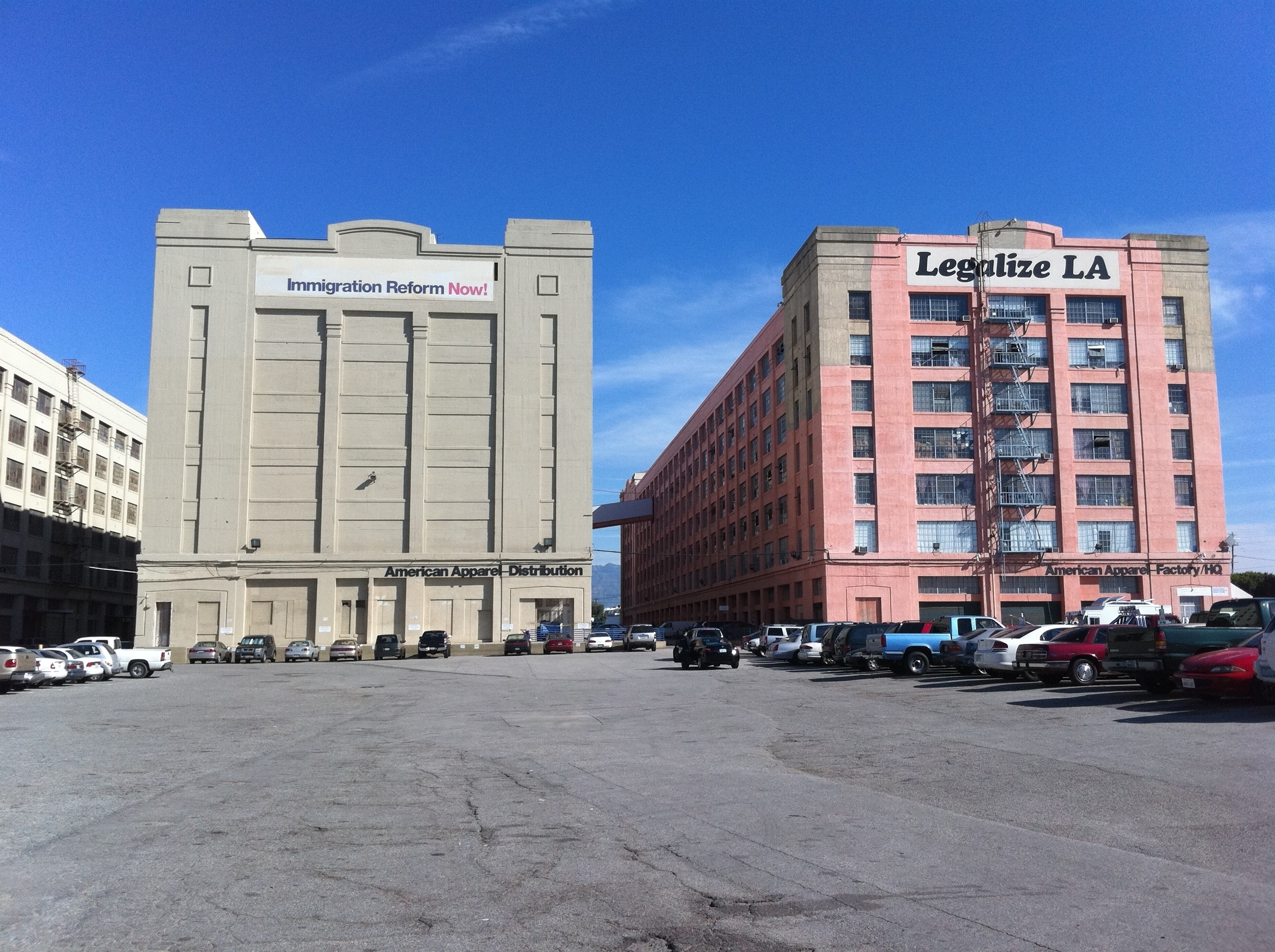 AA Factory